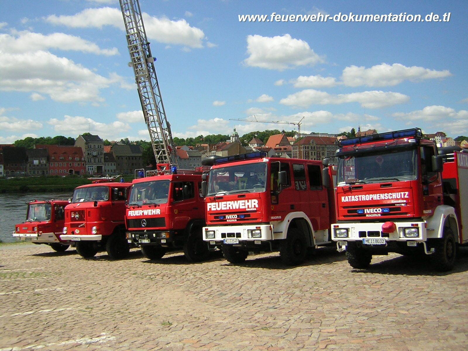 Fahrzeuge der Feuerwehr Meißen: Iveco Magirus DLK 23-12 CC nB (Drehleiter, 23 Meter Höhe bei 12 Meter Abstand, niedrige Bauart) IFA W50-L/A TLF 16 (inzwischen historisch) Mercedes-Benz LF 16/12 (Metz-Aufbau) Iveco Magirus LF 8/6 Iveco Magirus Rüstwagen (Kat[astrophen]-Schutz)